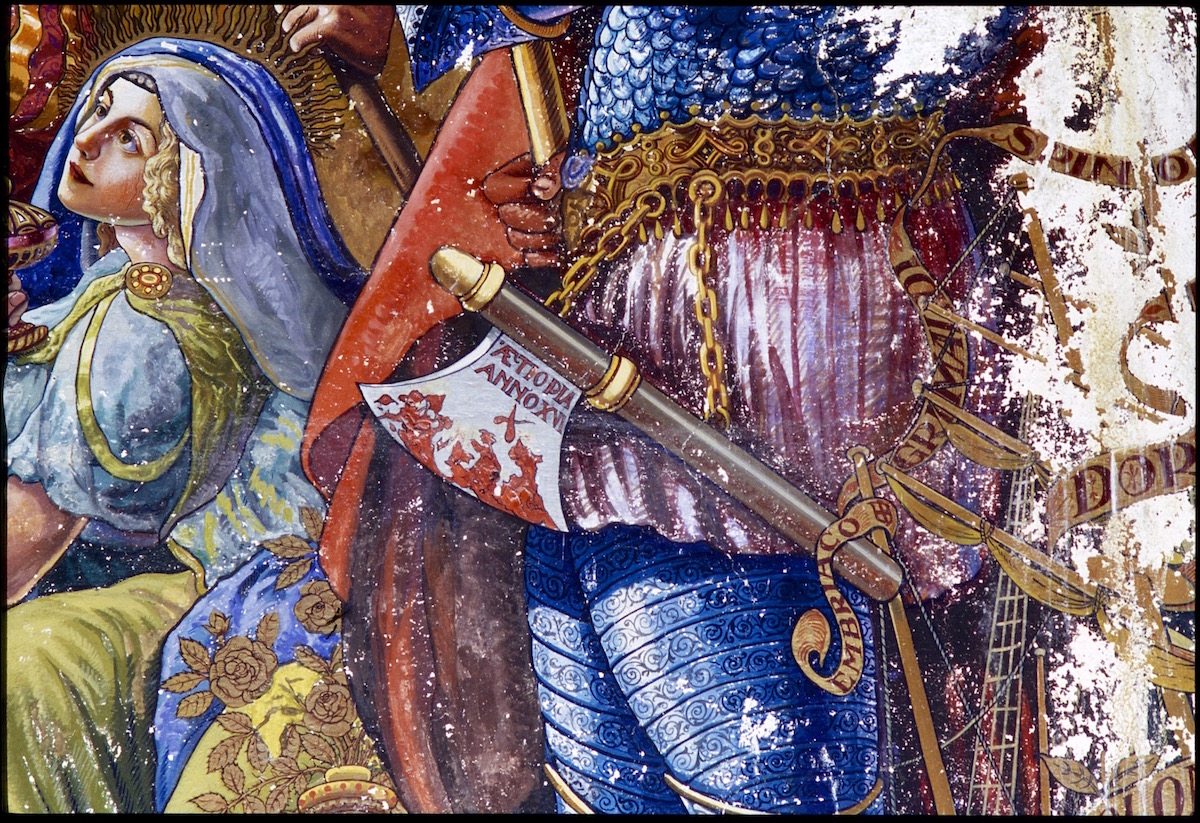 Affresco